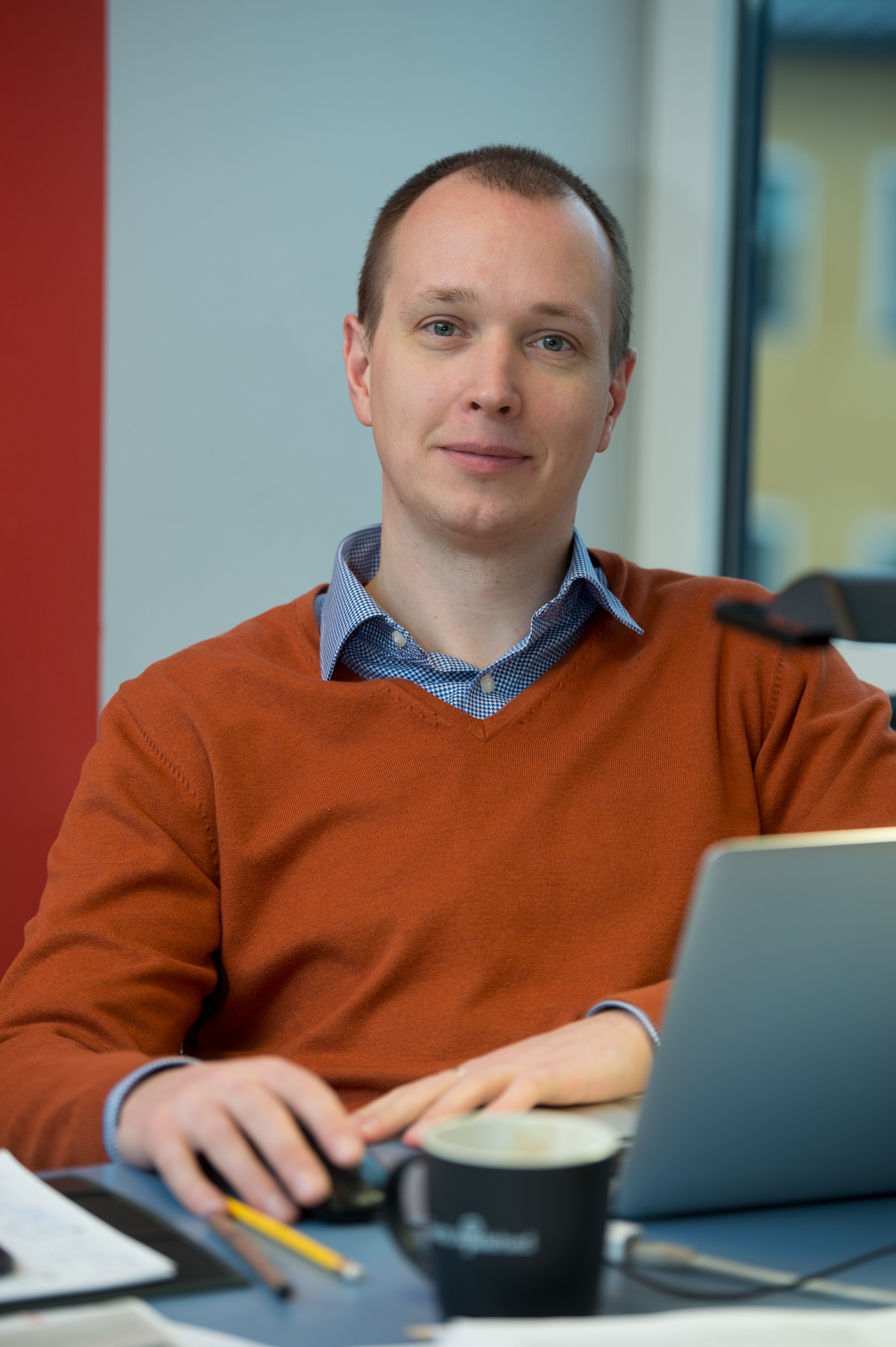 Toivo Tänavsuu